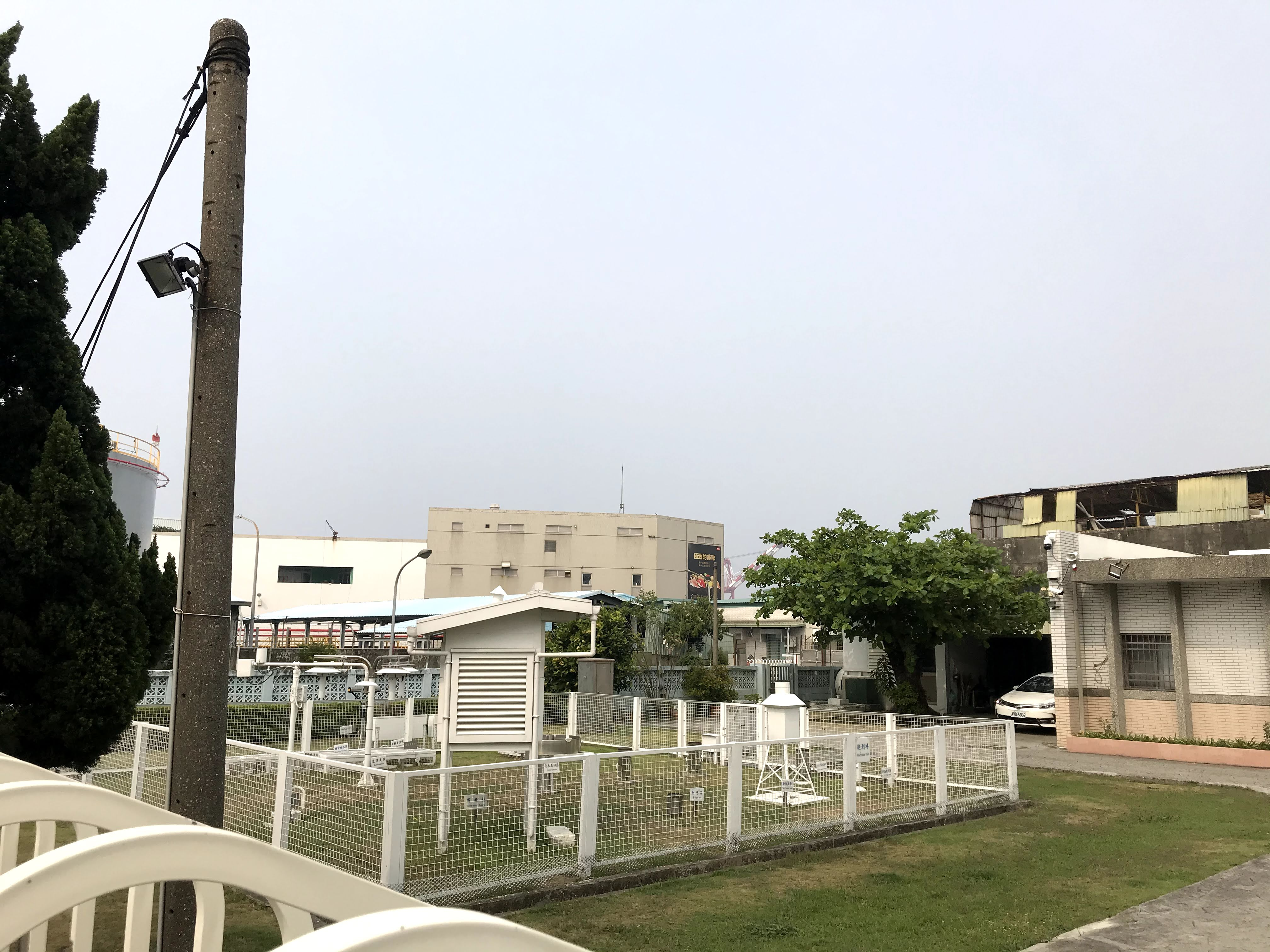 中文（台灣）: 交通部中央氣象局高雄氣象站觀測坪